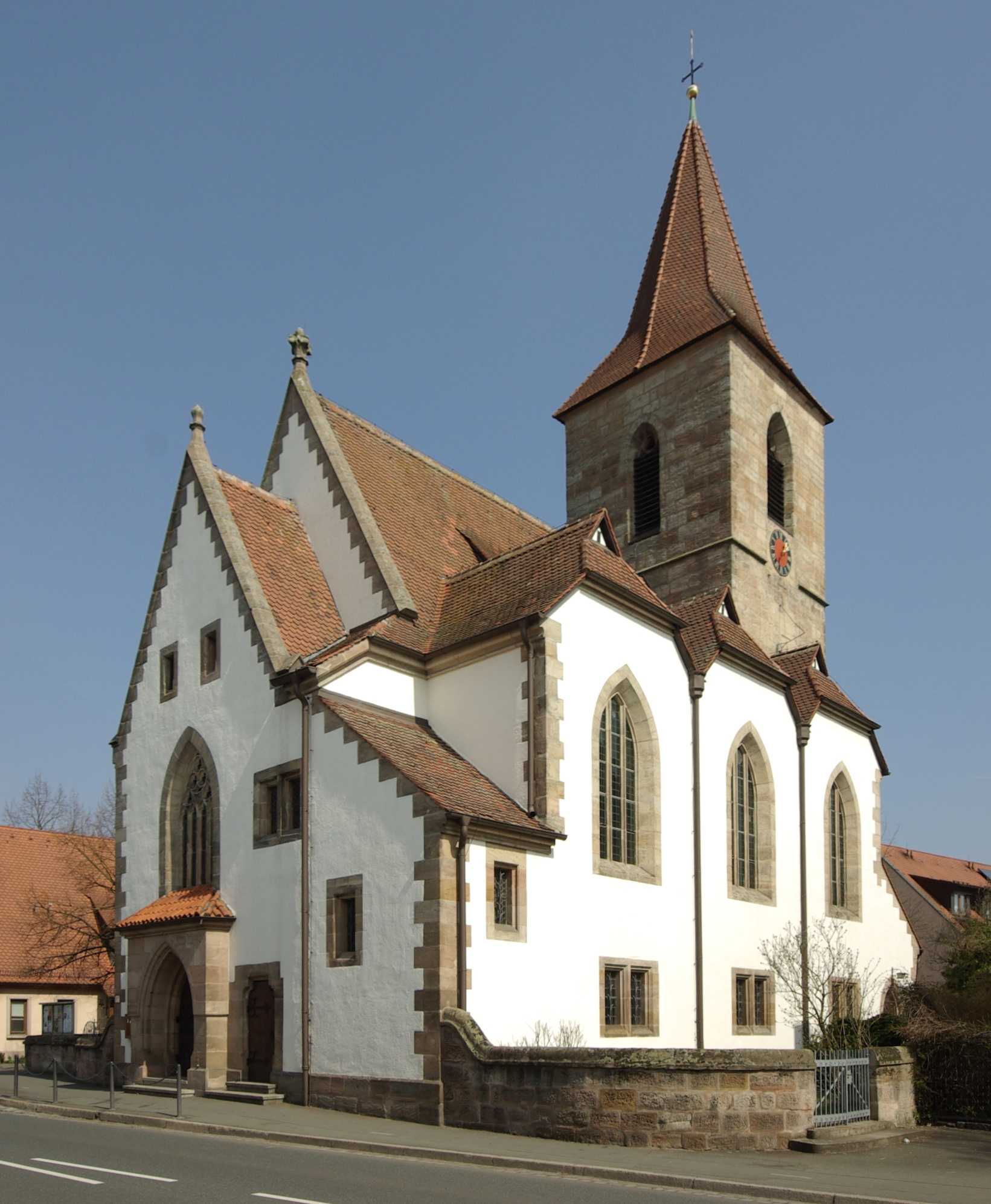 Egidienkirche im Erlanger Stadtteil Eltersdorf